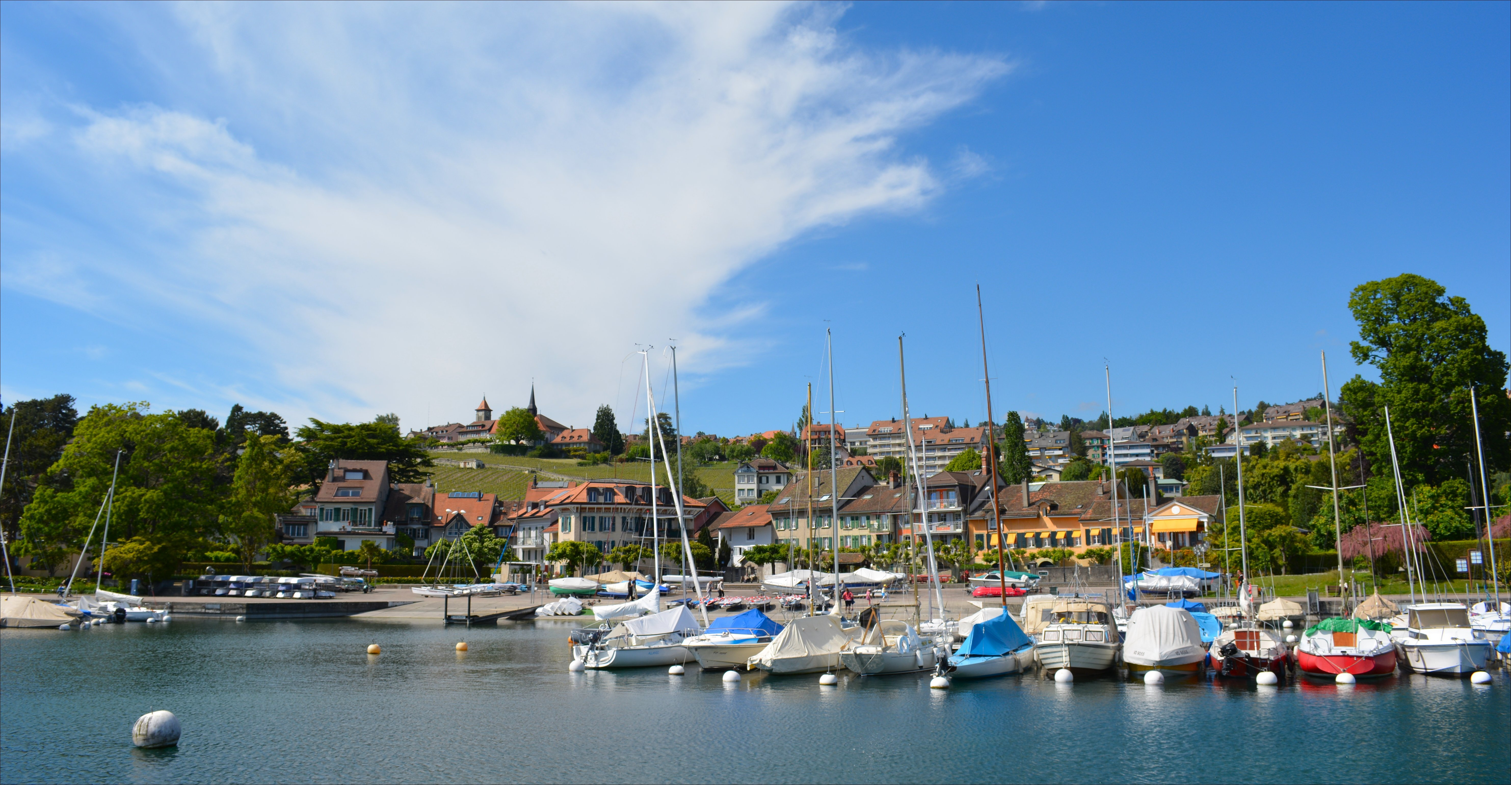 City of Pully, Canton de Vaud